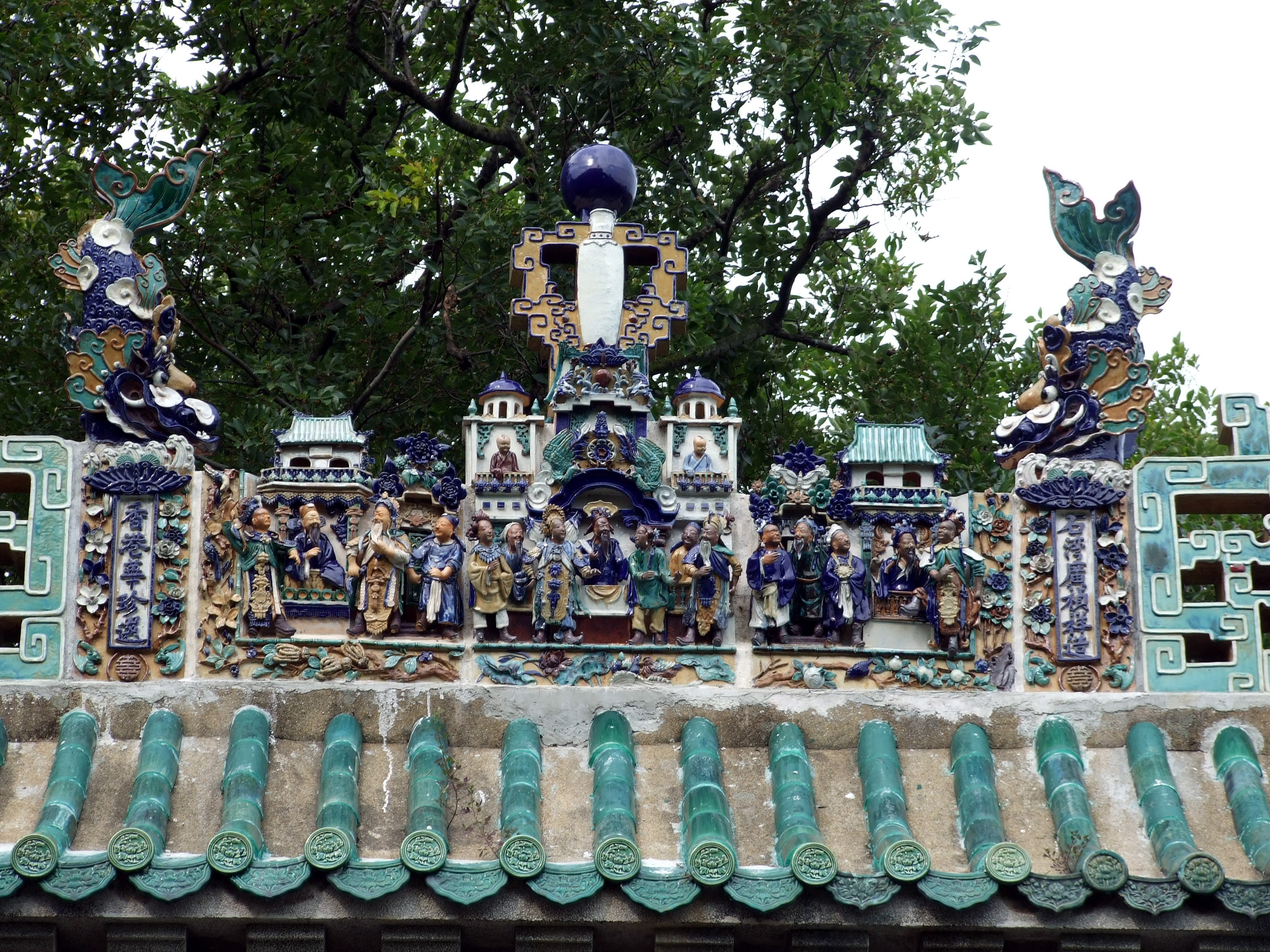 中文（香港）: 香海名山牌樓樓頂上的石灣陶塑脊飾